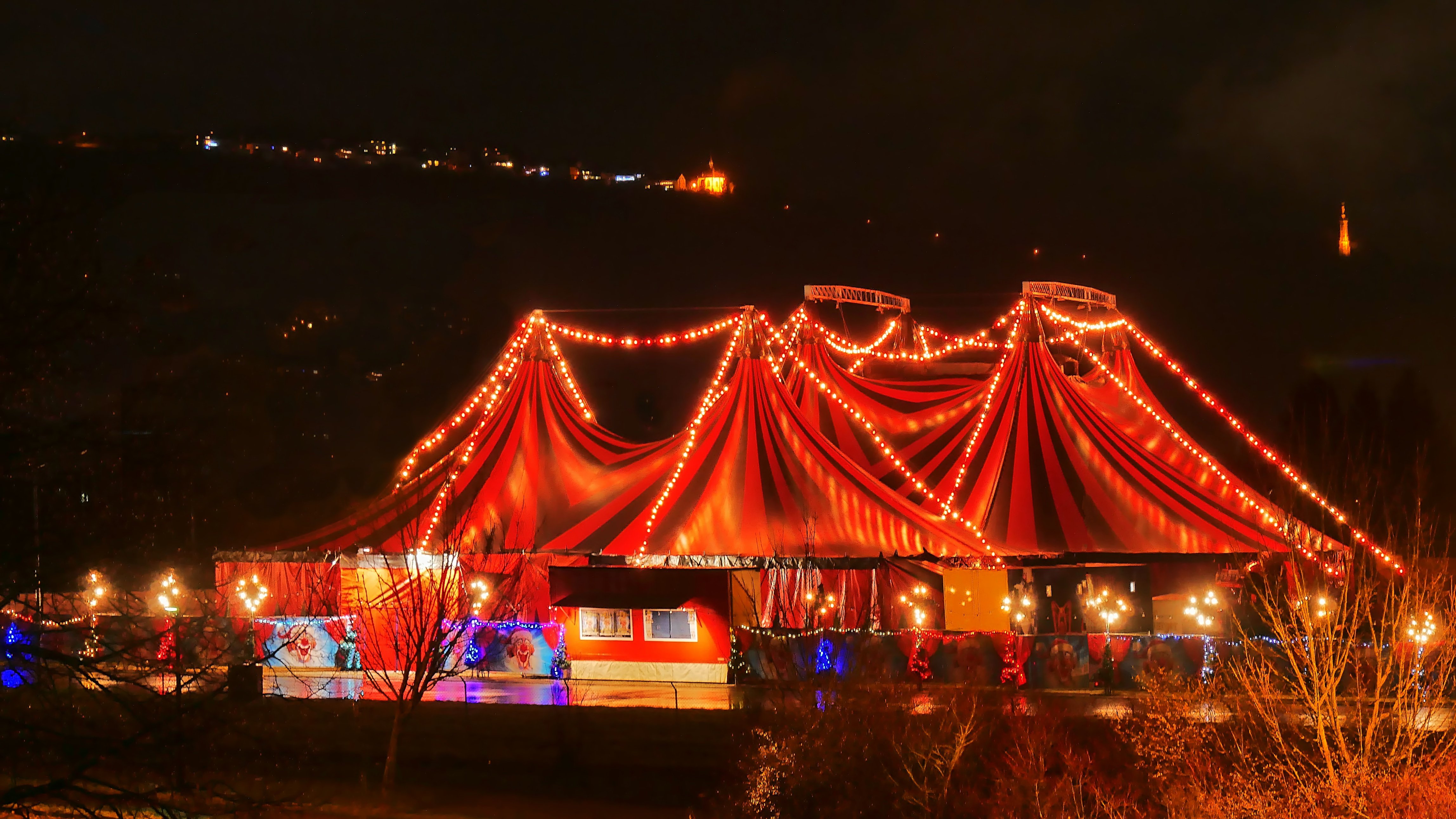 Trier (Germany), das neue Zelt des Weihnachtszirkus (Dezember 2017)